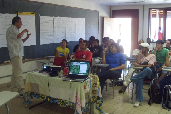 Cleodon Silva dando palestra sobre cultura digital a jovens